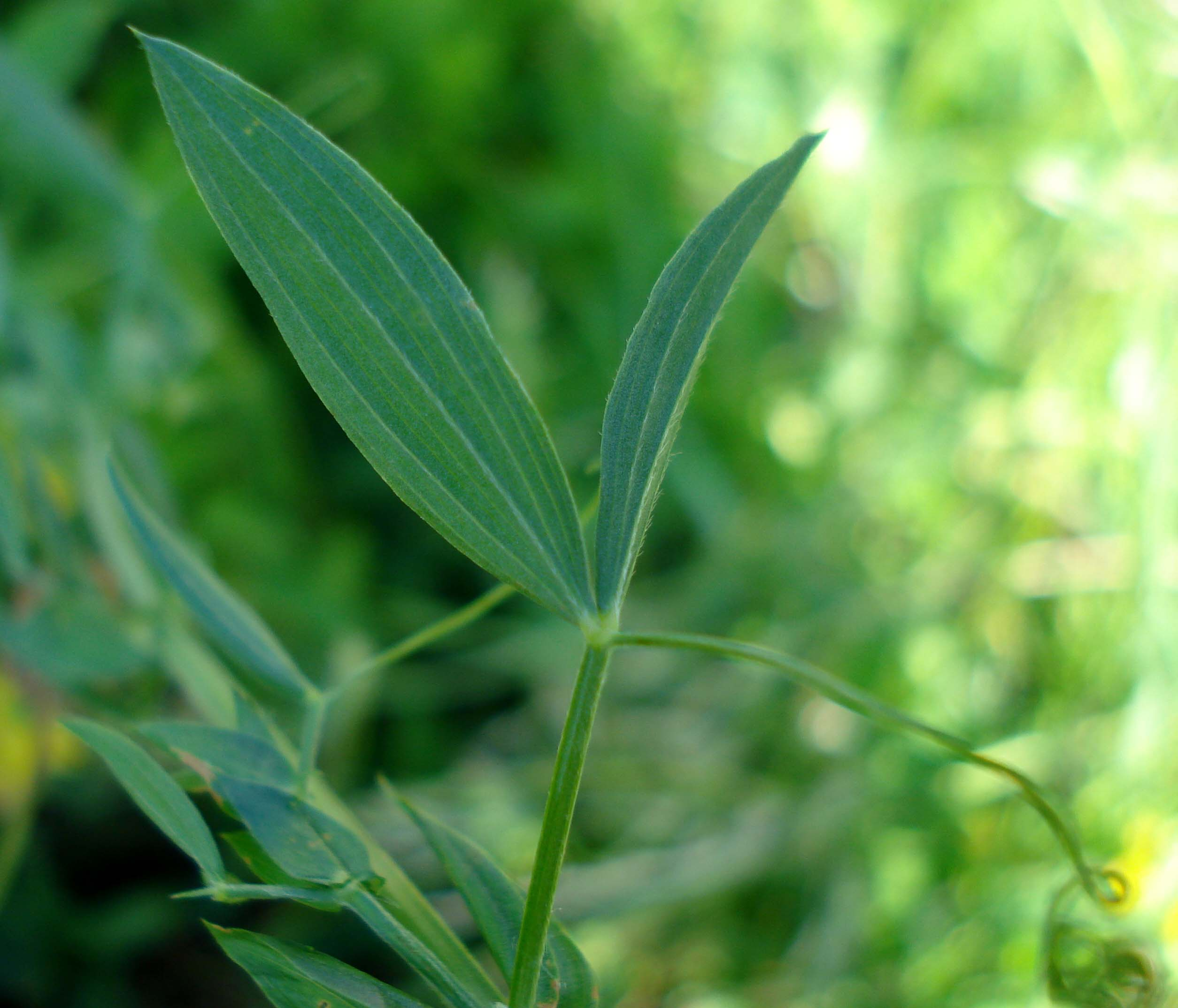 Lathyrus pratensis (Unterfranken, Germany)